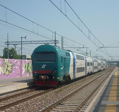 fs